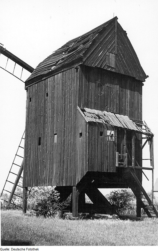 Original image description from the Deutsche Fotothek Massen-Niederlausitz-Gröbitz. Bockmühle